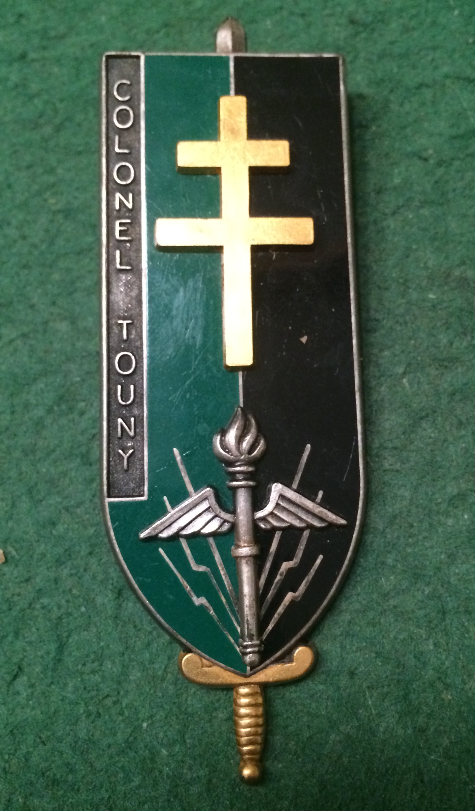 Insigne de la promotion ORSEM 1985 colonel Touny (Fraisse Paris), pour laquelle j'étais ORSEM professeur adjoint. L'insigne évoque le fait que ce résistant était compagnon de la libération (fond et croix de Lorraine). Le logo de l'ESORSEM et l'épée pour la promotion d'officiers d'état-major dont il est le parrain, lui même ayant été officier d'état-major